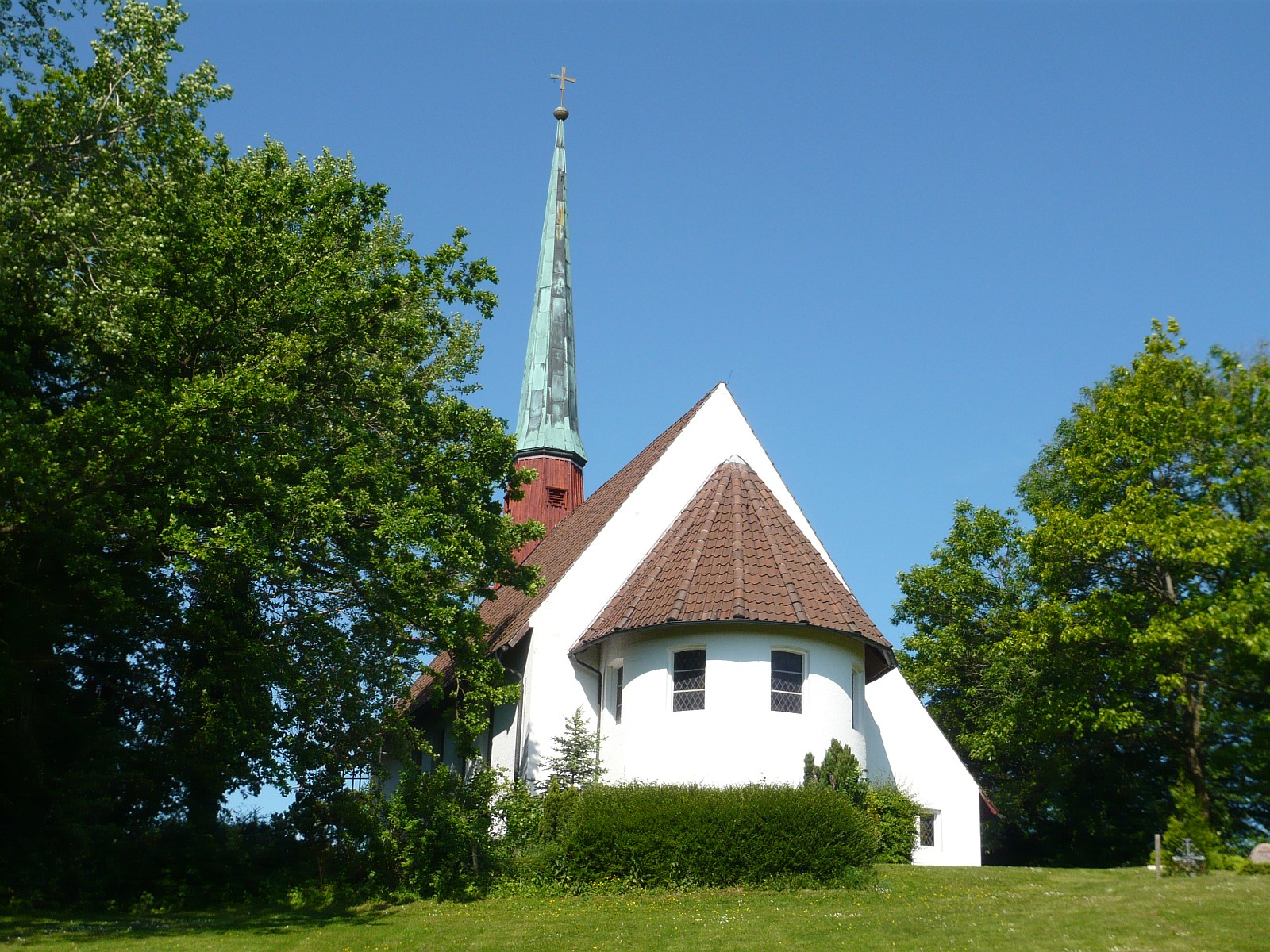 Die Kirche zu Fargau (Gemeinde Fargau-Pratjau), erbaut 1952.